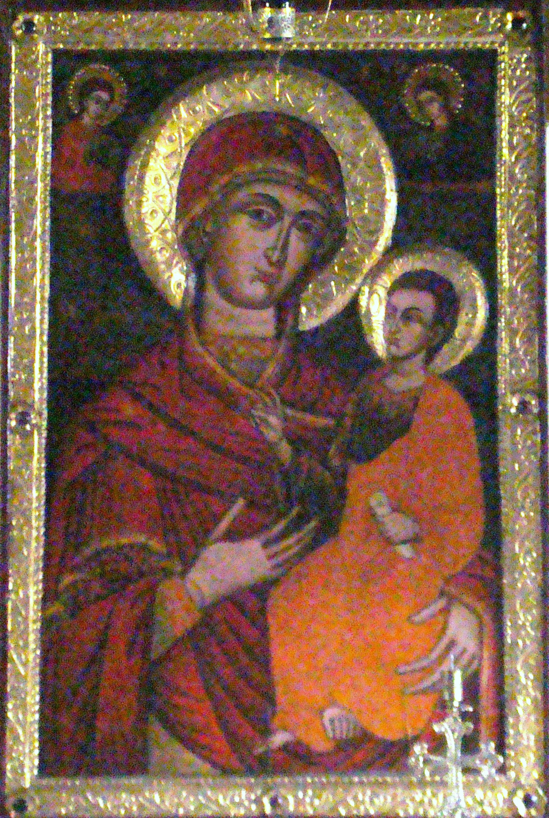 Biserica de lemn "Sf. Nicolae" a mănăstirii Lupşa, sat VALEA LUPŞII; comuna LUPŞA